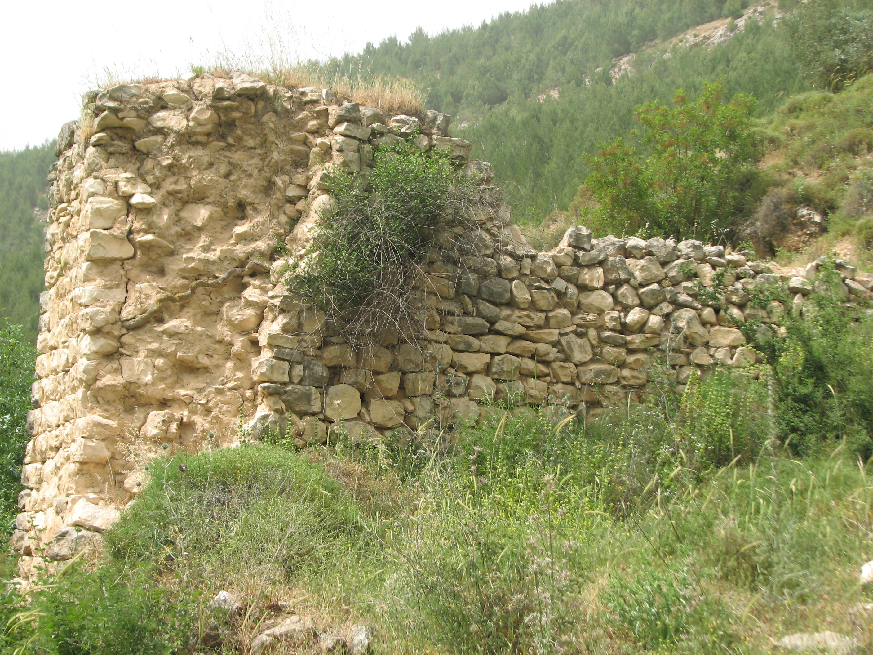 טחנת דאר חביב העליונה בנחלגוש חלב